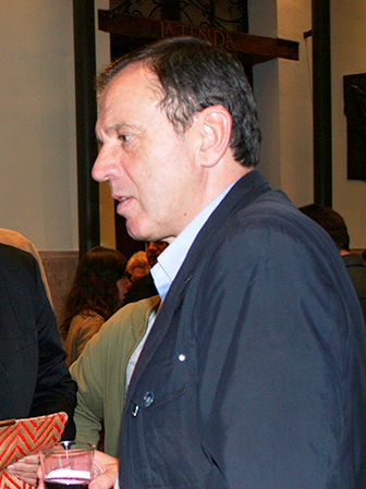 El Paraninfo de La Nau de la Universitat de València acogía este jueves, 8 de octubre, un acto con motivo del segundo aniversario de eldiariocv.es. Ignacio Escolar analizó junto al president de la Generalitat, Ximo Puig, la vicepresidenta del Consell, Mónica Oltra, y el líder de Podemos en la Comunitat Valenciana, Antonio Montiel, el 'Acord del Botànic' cien días después de la toma de posesión del nuevo Consell.